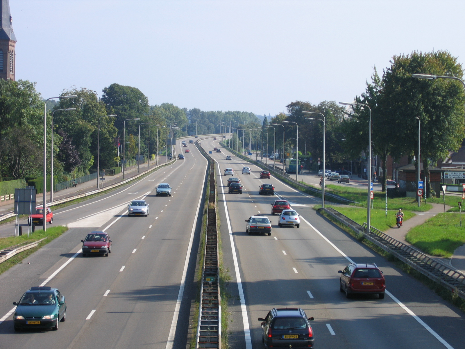 N325 door Lent